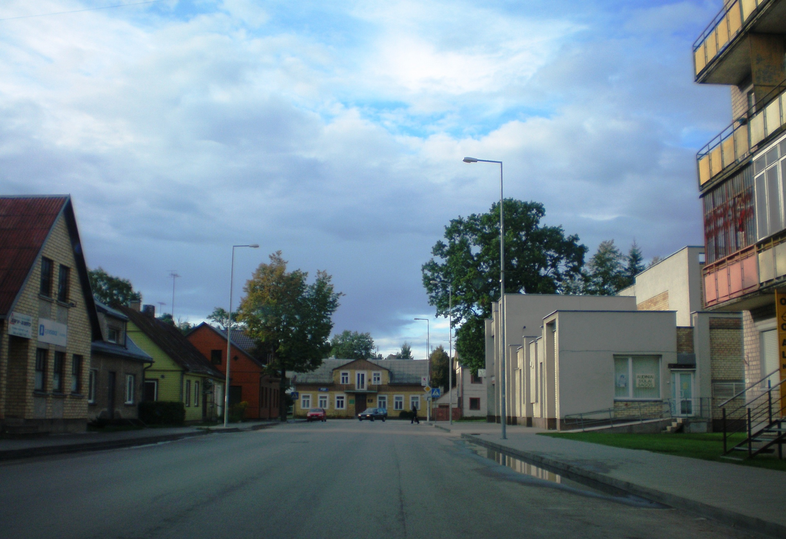 Prienai, Vytauto gatvė